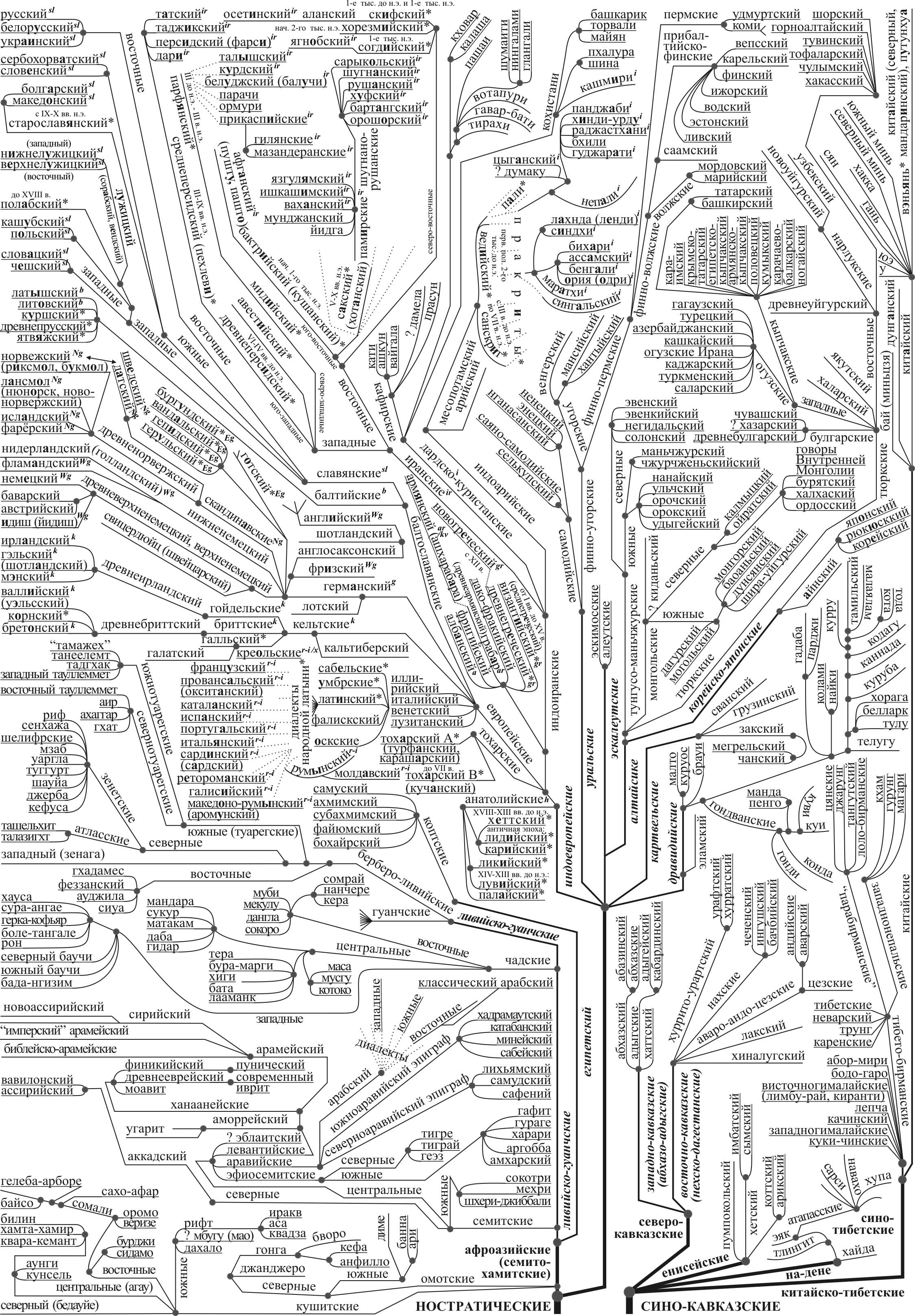 Карта языков мира (Часть I) (для статьи Языки Мира) Источник: Литвинов Н.Н. Стратегический менеджмент на примере Азиатско-Тихоокеанского региона: Монография. — М., 2010. — 200 [10] с. — (Strategic Management in the Asian-Pacific) - ISBN 978-5-91252-029-7